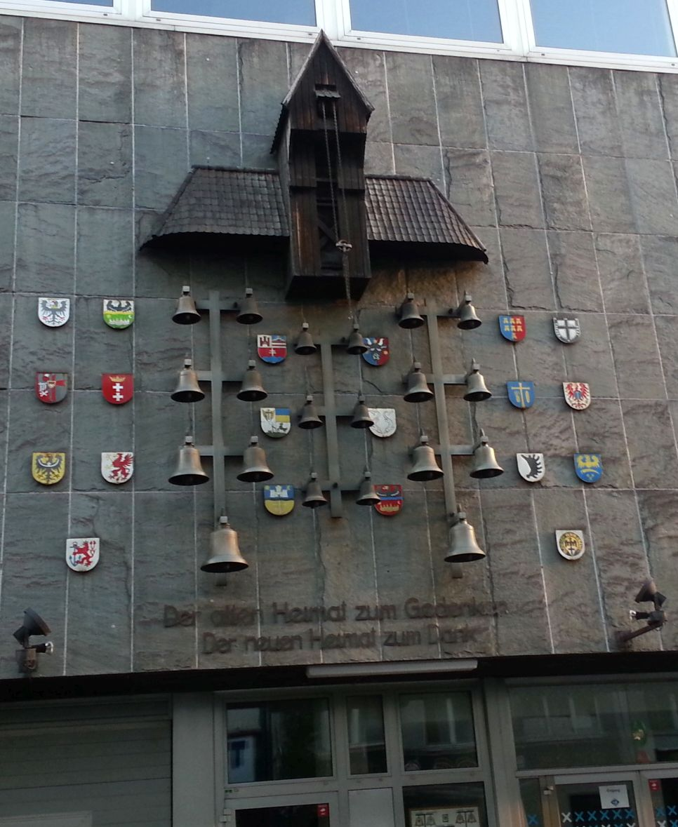 Glockenspiel am Gerhart-Hauptmann-Haus. Deutsch-osteuropäisches Forum in Düsseldorf